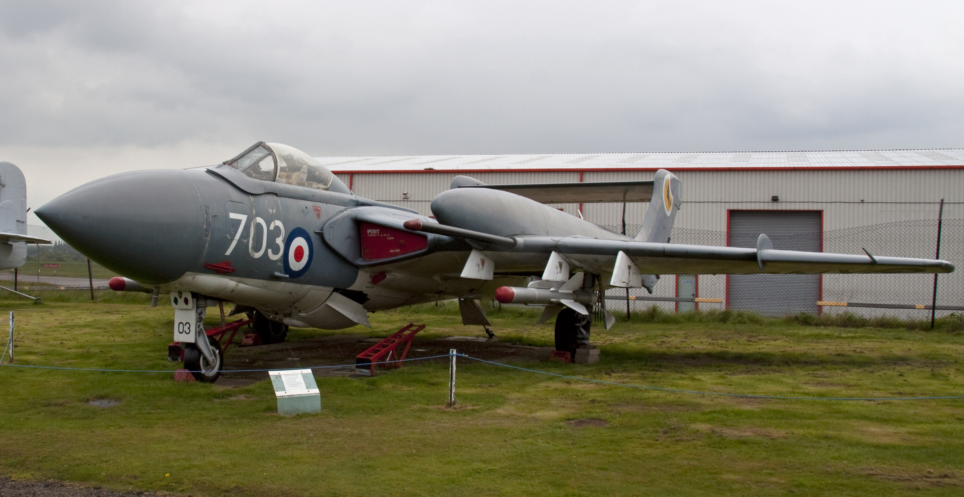 De Havilland Sea Vixen